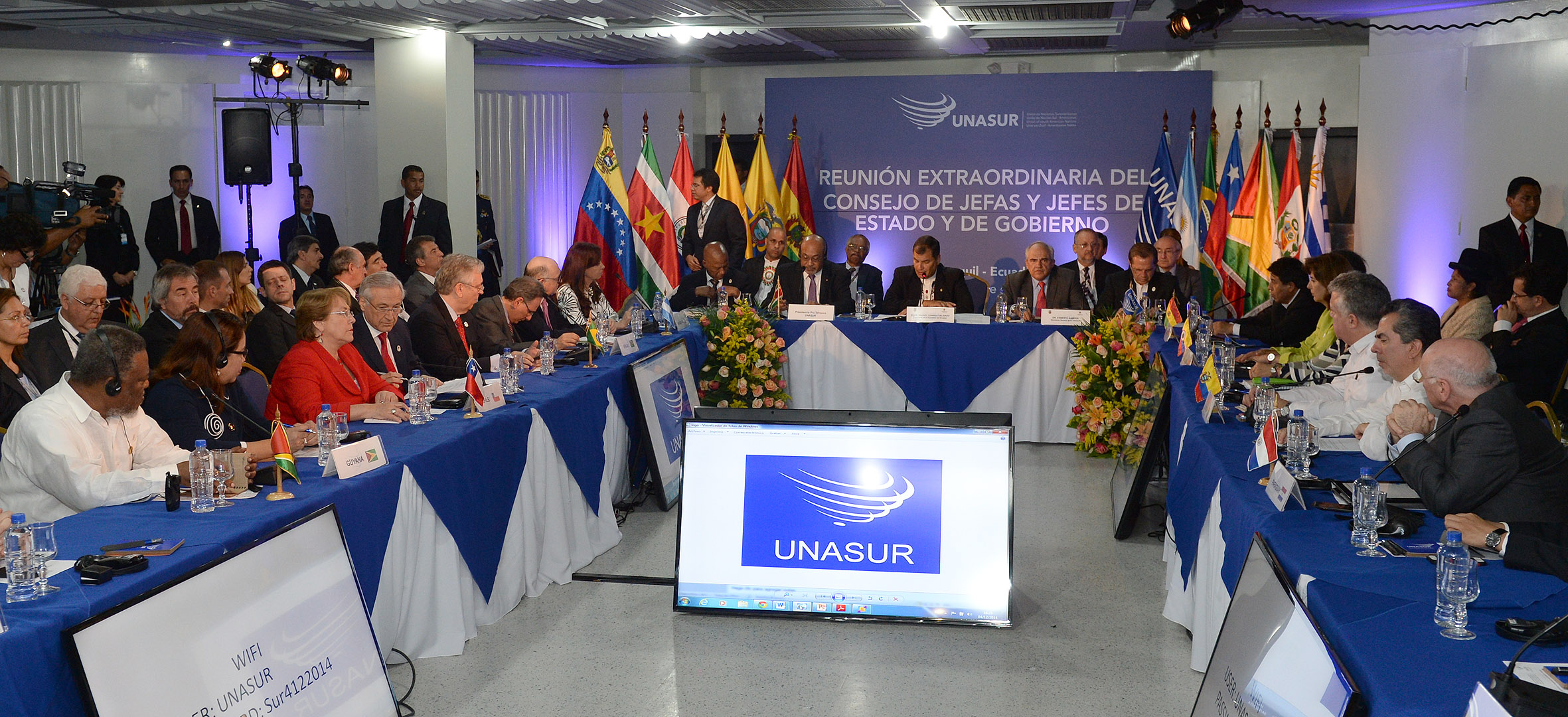 Gobierno de Chile